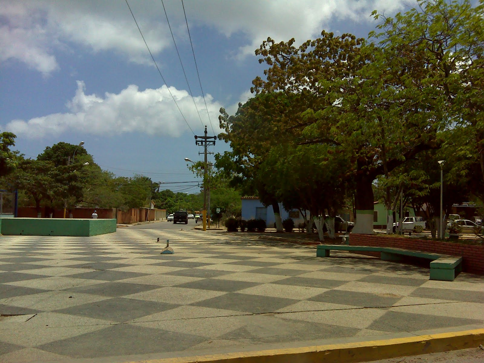 nueva esparta